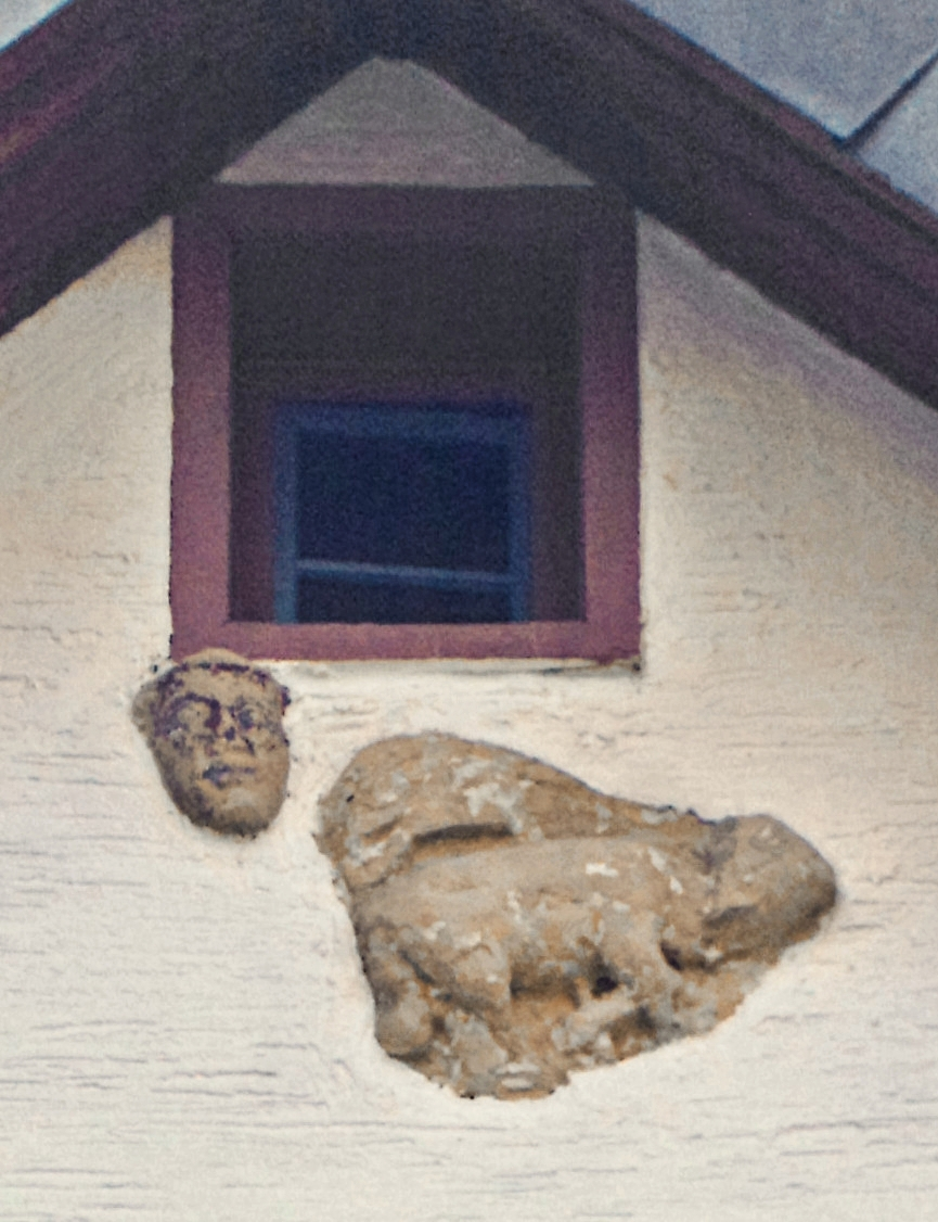 Kloster Höningen, Pfalz, Spoliensteine, eingemauert in Wohnhaus, Hauptstraße (Tierfigur und Mönchskopf)